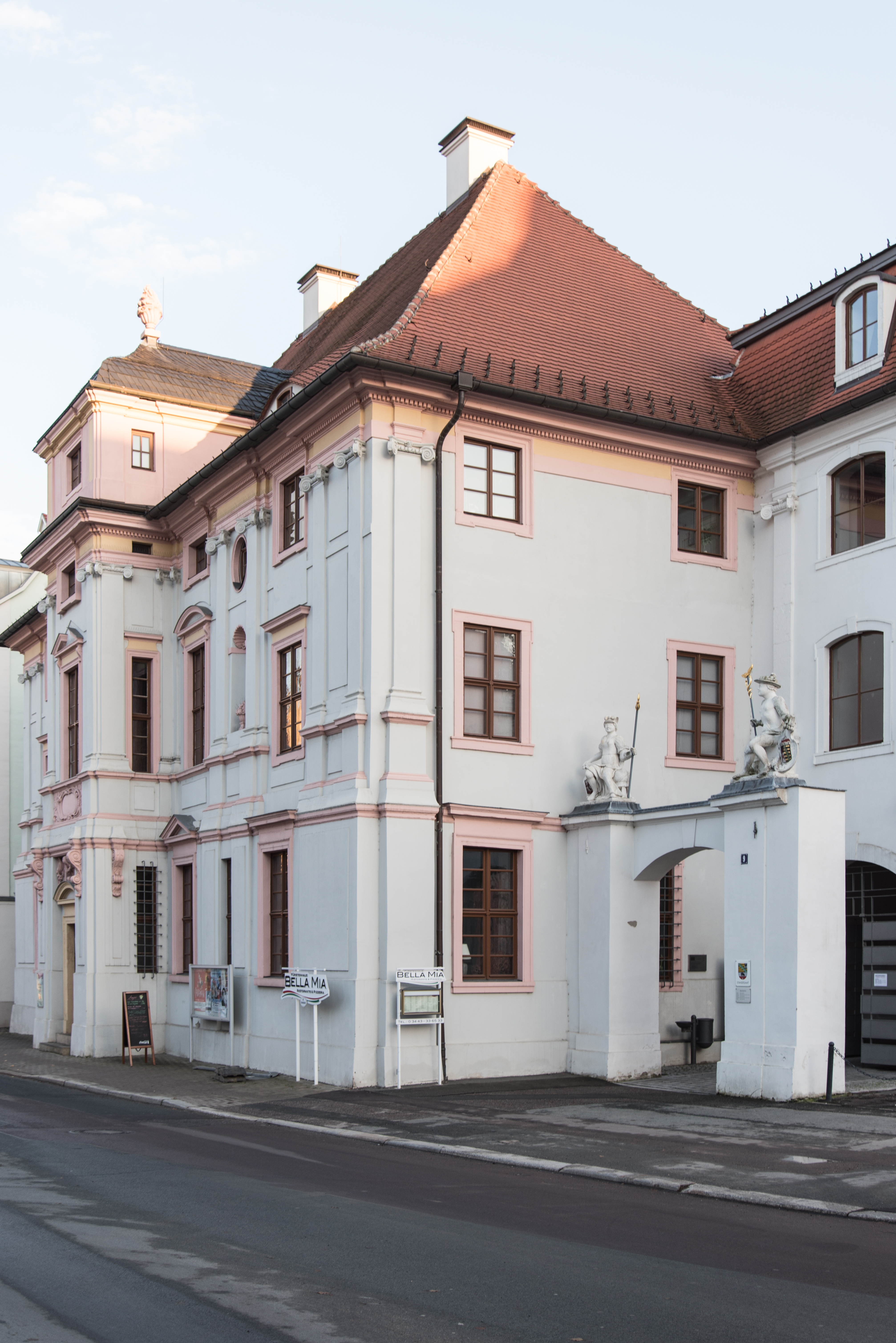 Weißenfels, Leipziger Straße 9